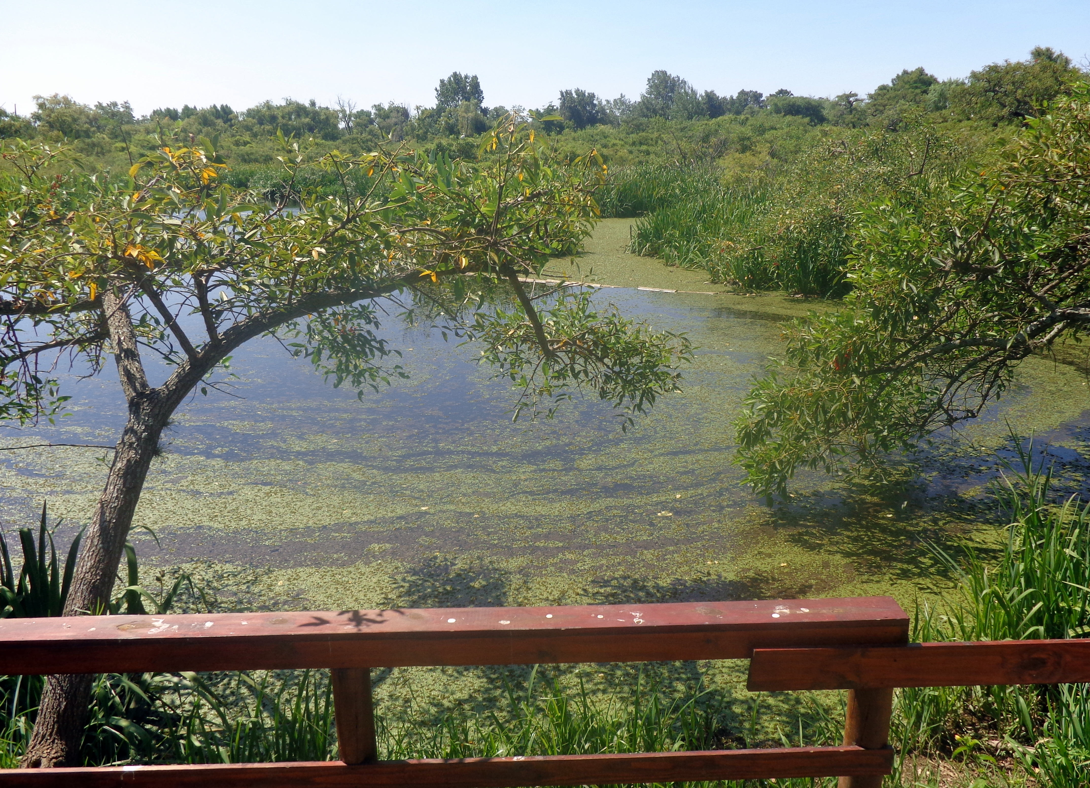 En la costa del Río de la Plata de Acassuso, en el partido de San Isidro, sobre el camino de la Ribera, entre la calle Vicente López y las calles Planes y Almafuerte, a la altura de la Avenida del Libertador 15400.